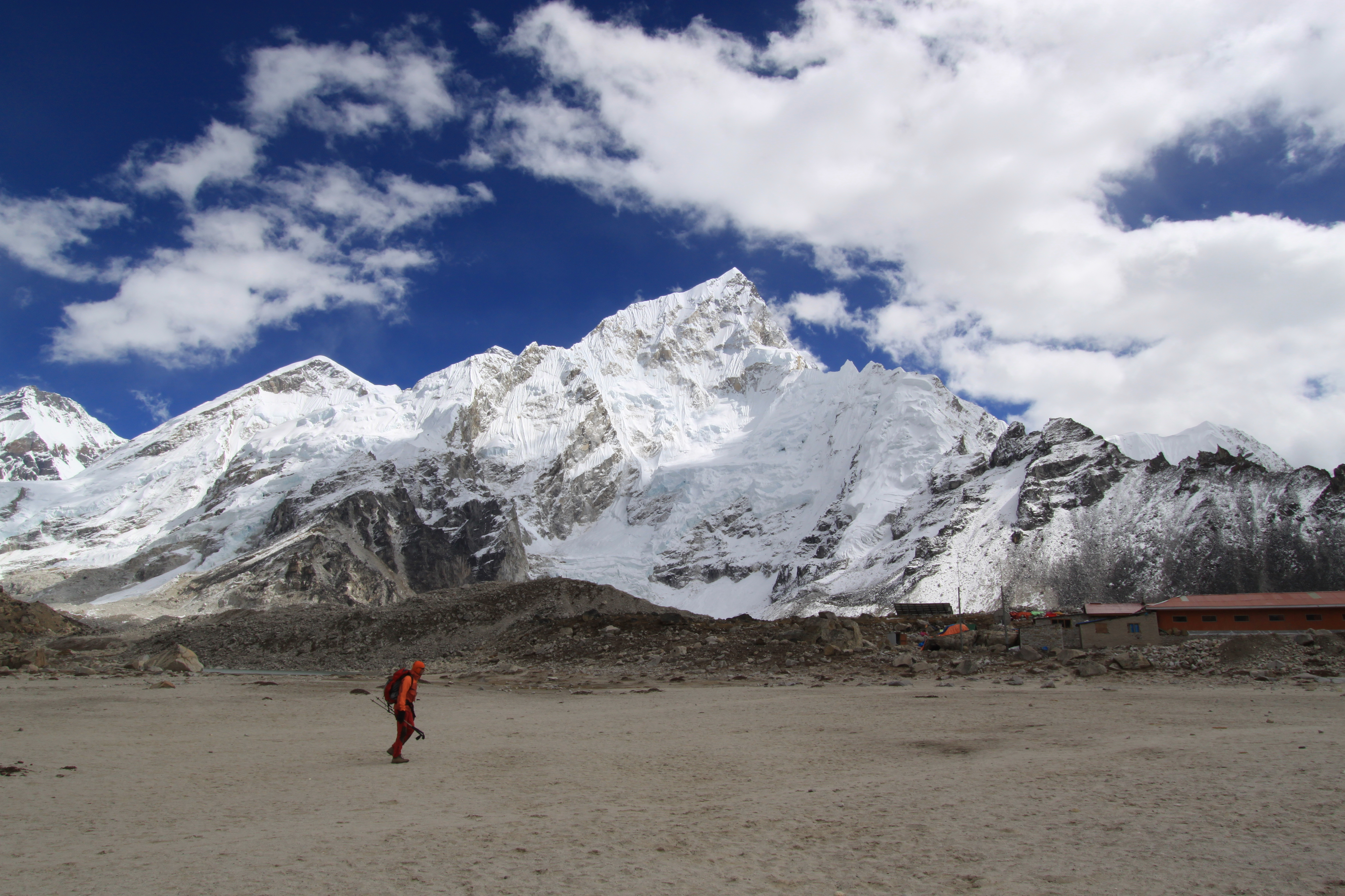 Blick über das alte Seebett bei gorak Shep auf den Nuptse, dahinter Mount Everest Spitze etc.. Über das Seebett läuft ein vom Kallar Pathar kommender Trekker.